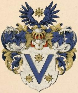 Luederi suguvõsa aadlivapp